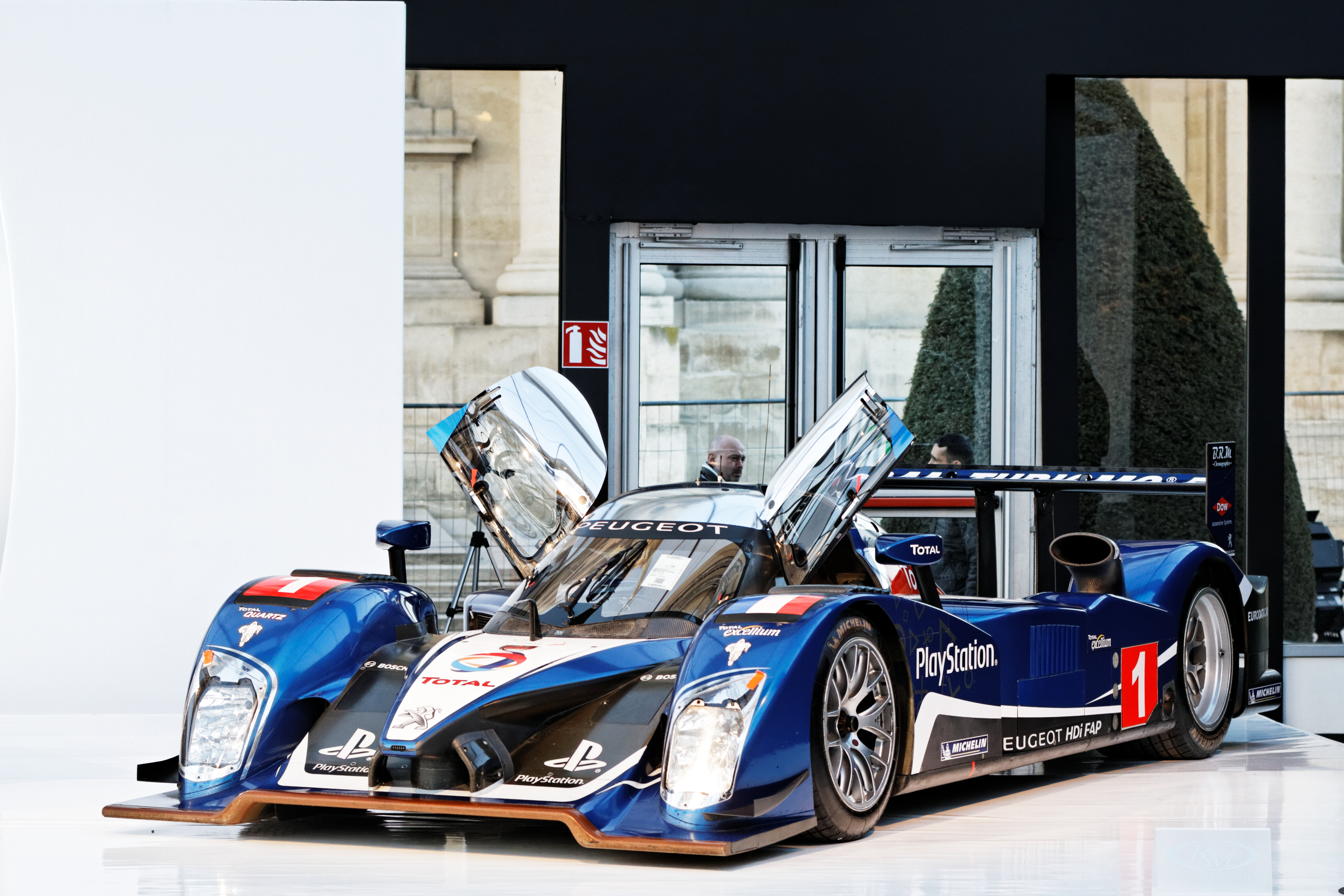 Une Peugeot 908 HDI FAP Le Mans prototype de 2008.